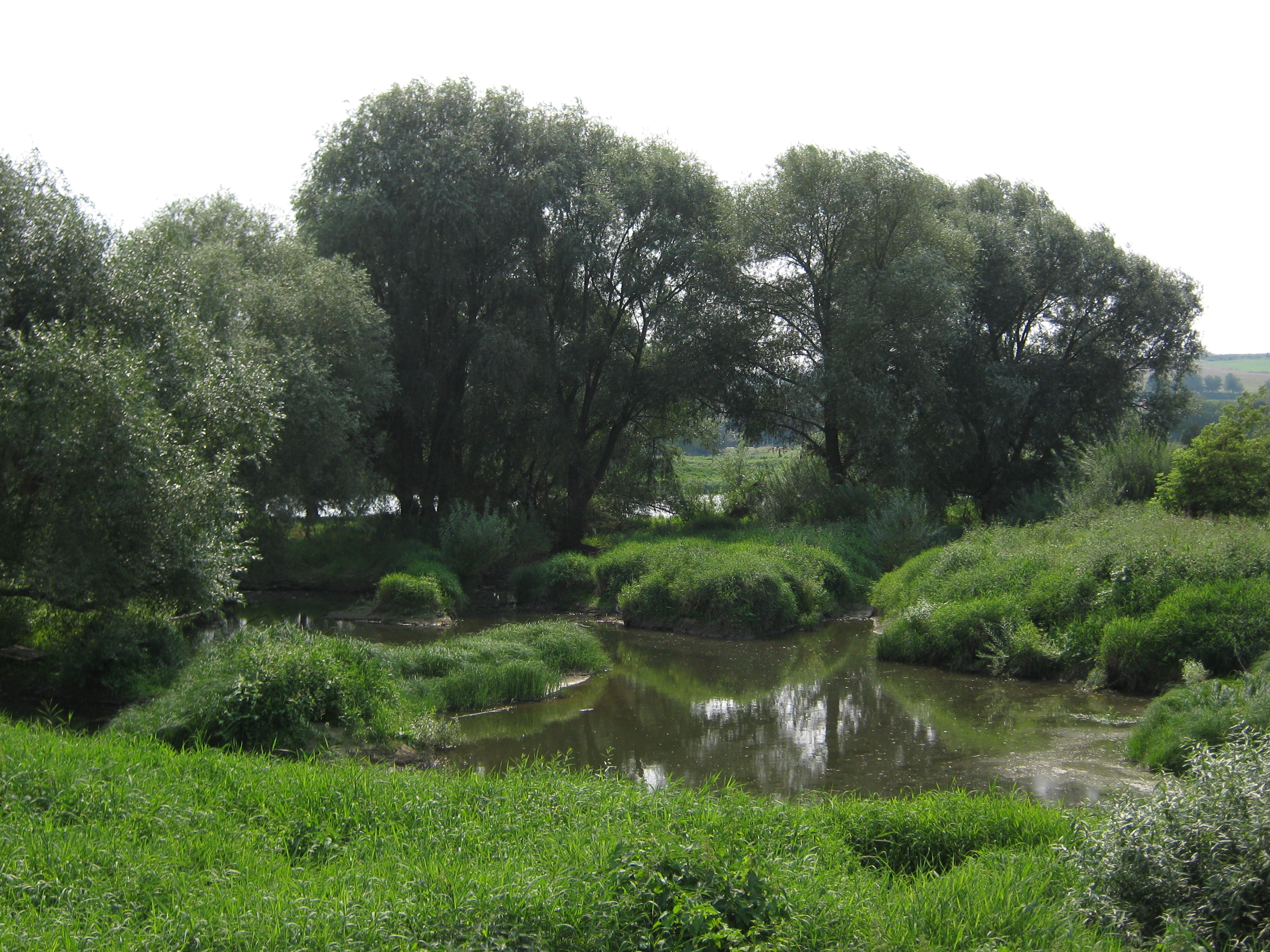 Verlandungszone am oberen Ende des Altarmes